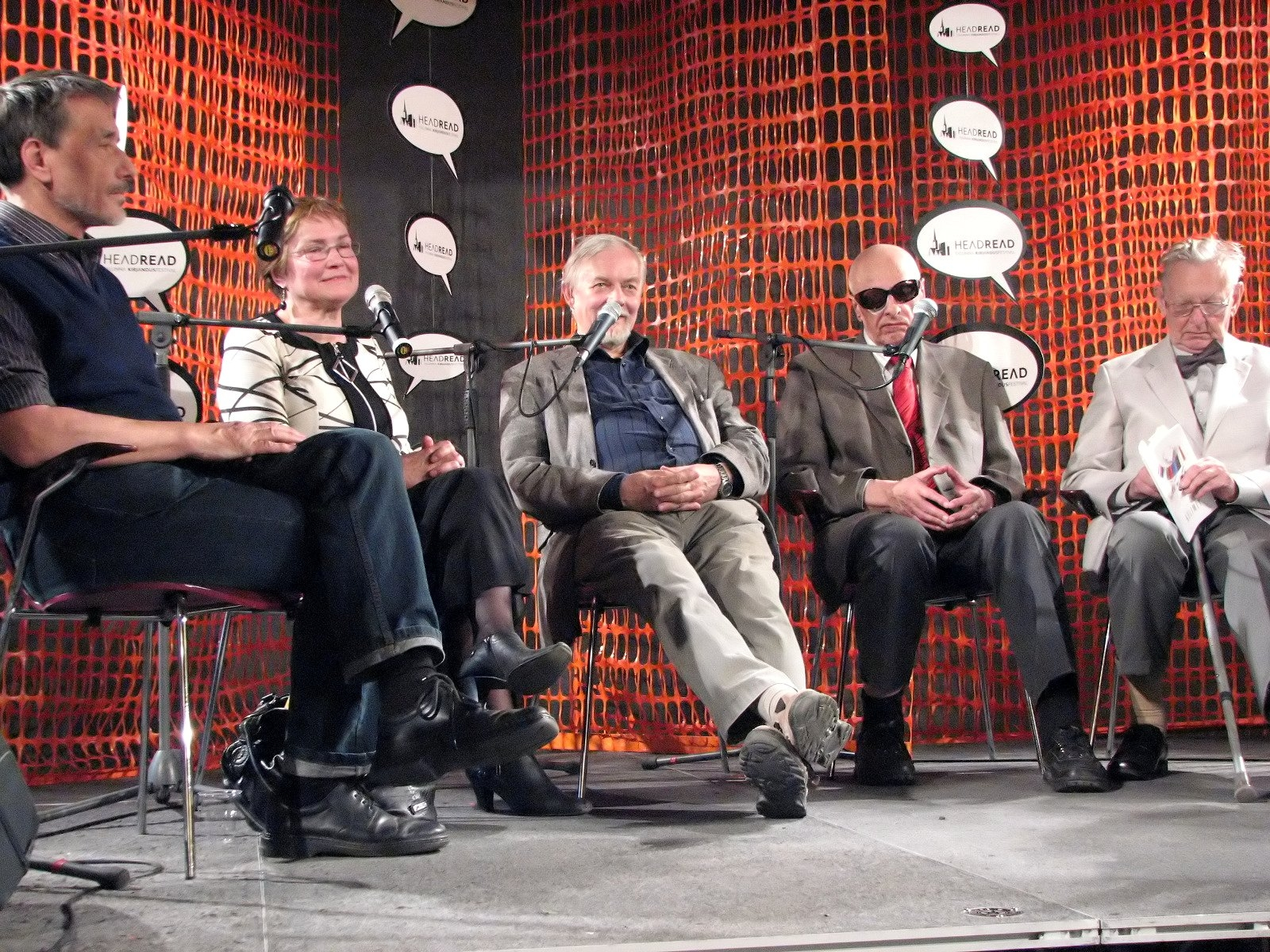 Osa nn kassetipõlvkonna liikmeid (vasakult: Paul-Eerik Rummo, Ly Seppel, Andres Ehin, Mats Traat ja Enn Vetemaa) esinemas kirjandusfestivalil HeadRead